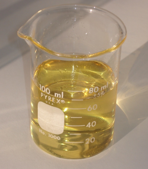 Biodiesel de soja (B100); Soybean Biodiesel (B100)